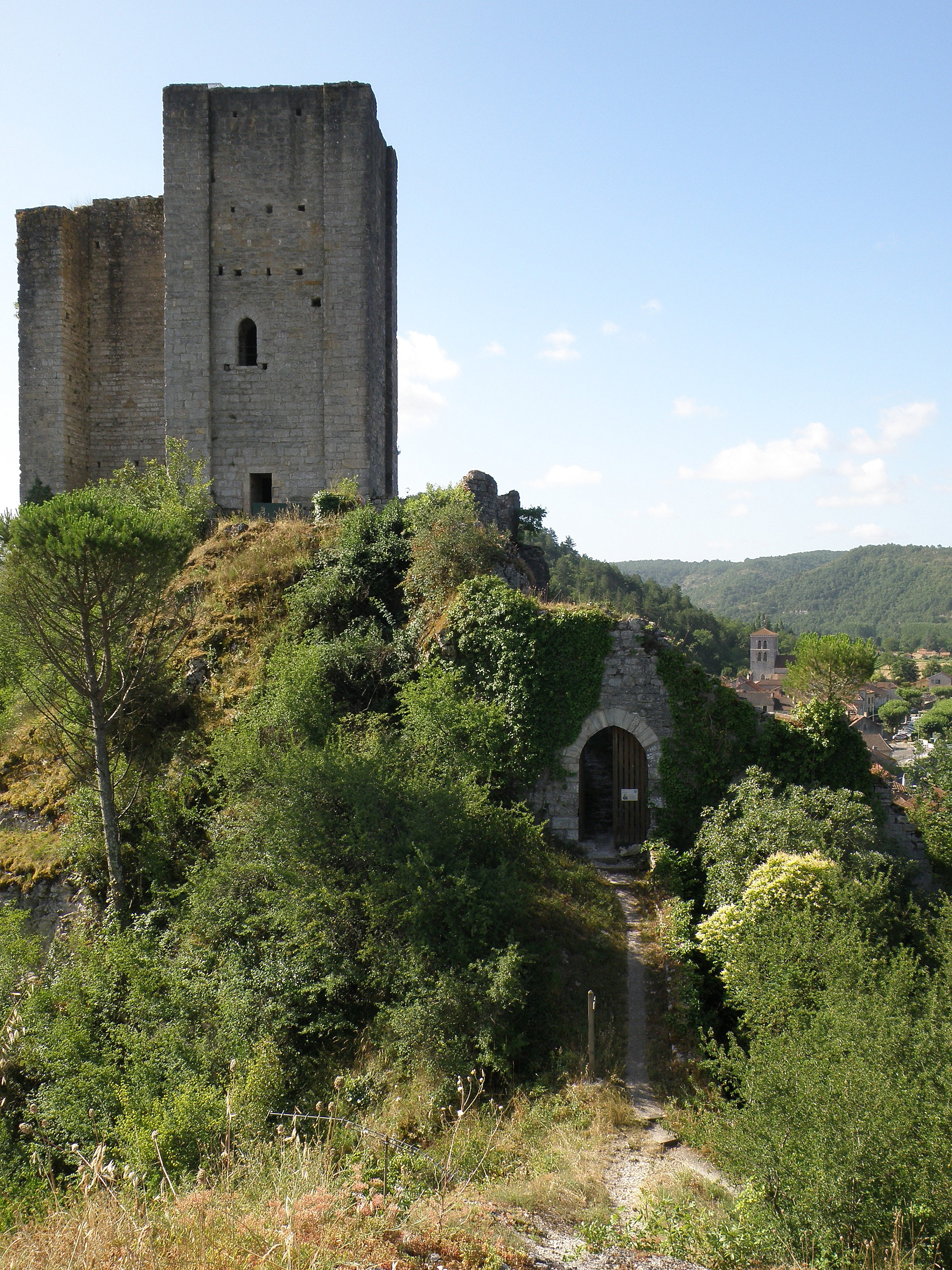 Luzech, ville dans le département du Lot, région Midi-Pyrénées, France. Donjon épiscopal du XIIe siècle, haut de 24 mètres, coiffant le rocher de Saint-Projet, à l’endroit où l’isthme du cingle (=méandre) de Luzech est le plus resserré. Face nord de la tour. À l'avant-plan, chemin montant au sommet de la butte de l'Impernal, située plus au nord, derrière nous. Au fond à droite, ville de Luzech avec clocher de l'église Saint-Pierre. Coup d'œil vers le sud.